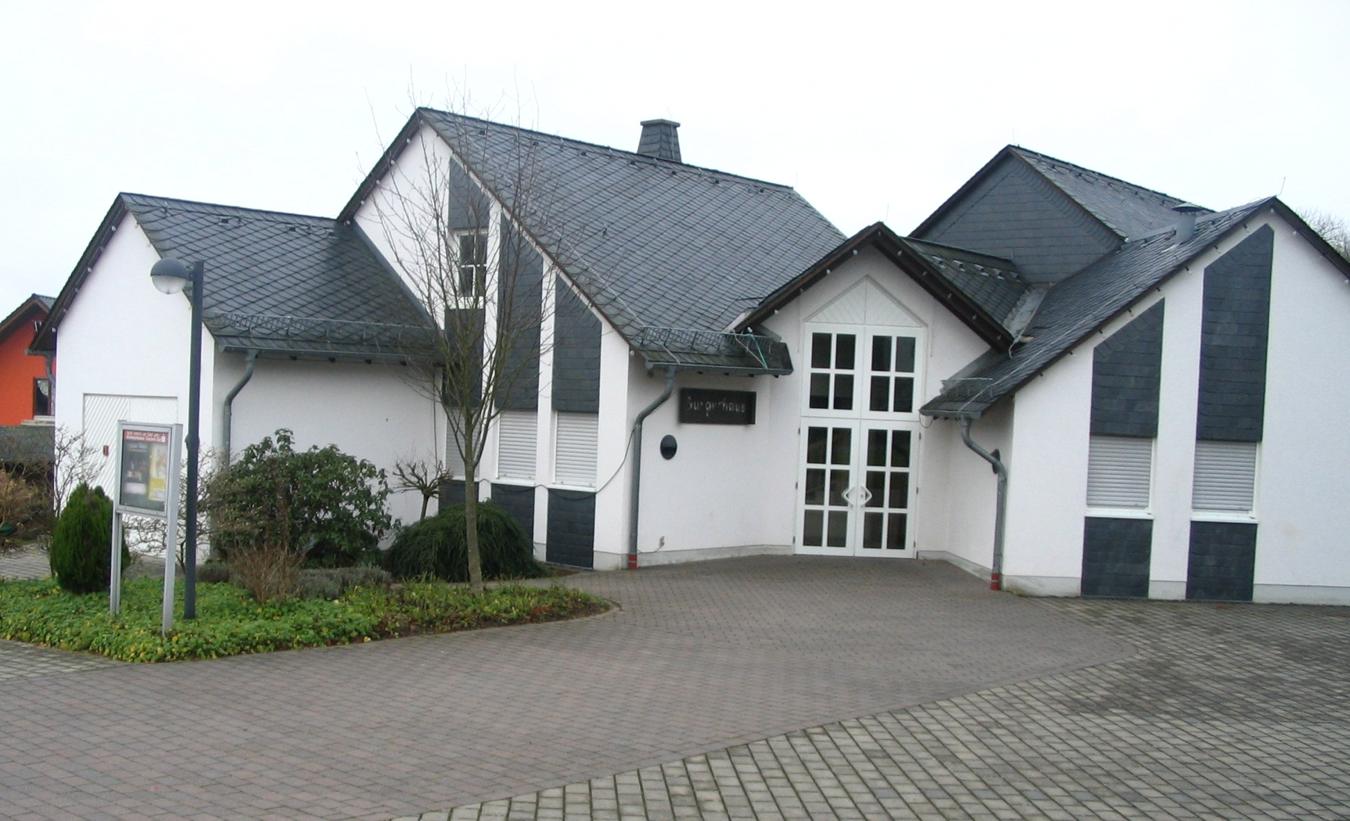 Bürgerhaus in Walhausen im Hunsrück